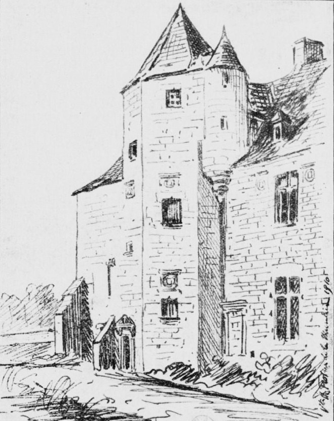 Le château de Beaumanoir-Eder en Le Leslay (lieu de naissance probable de Guy Eder de La Fontenelle, dessin de 1910, J. Baudry, La Fontenelle le ligueur et le brigandage en Basse-Bretagne pendant la Ligue